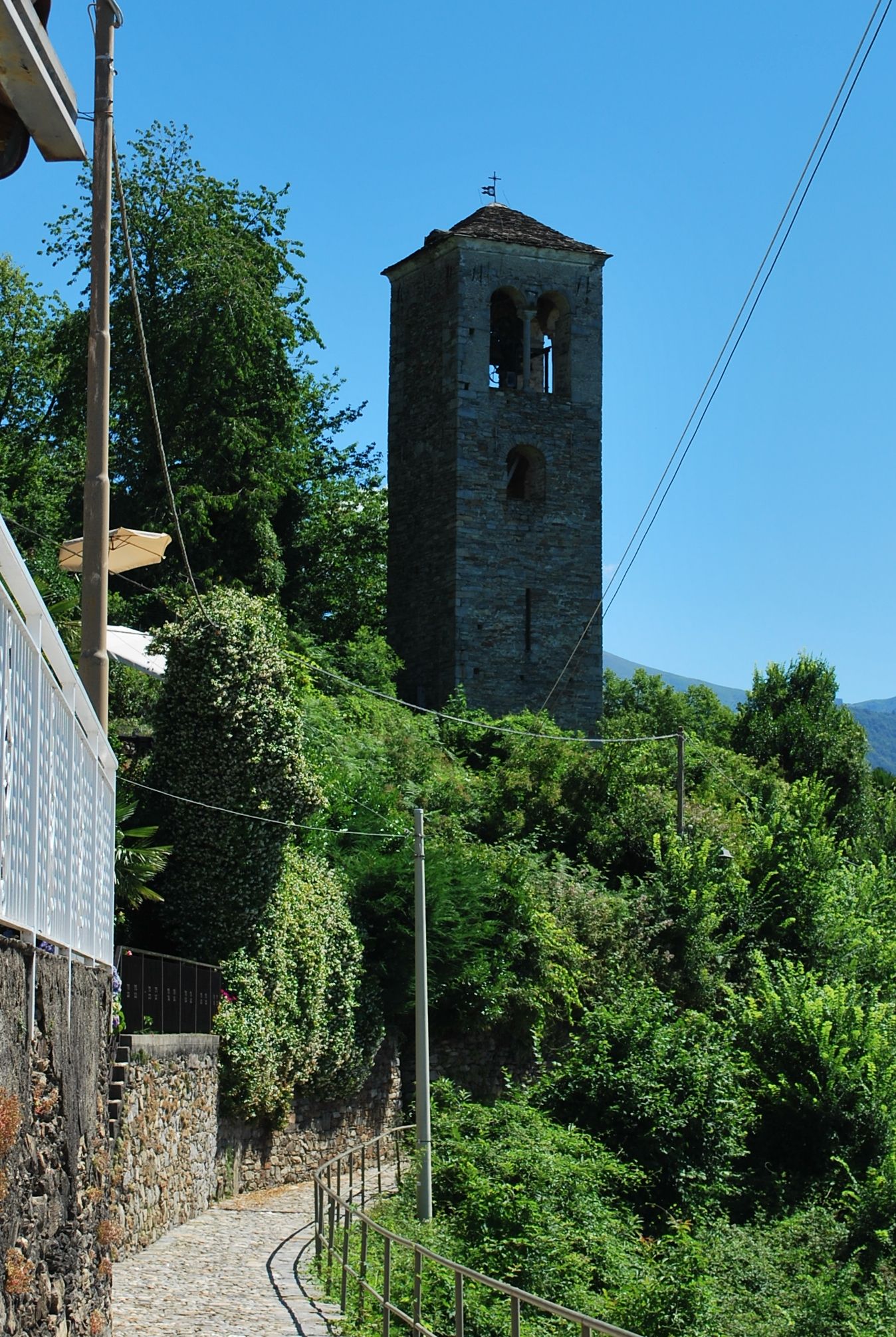 Campanile della chiesa di San Martino - Campagnano (Maccagno con Pino e Veddasca) VA